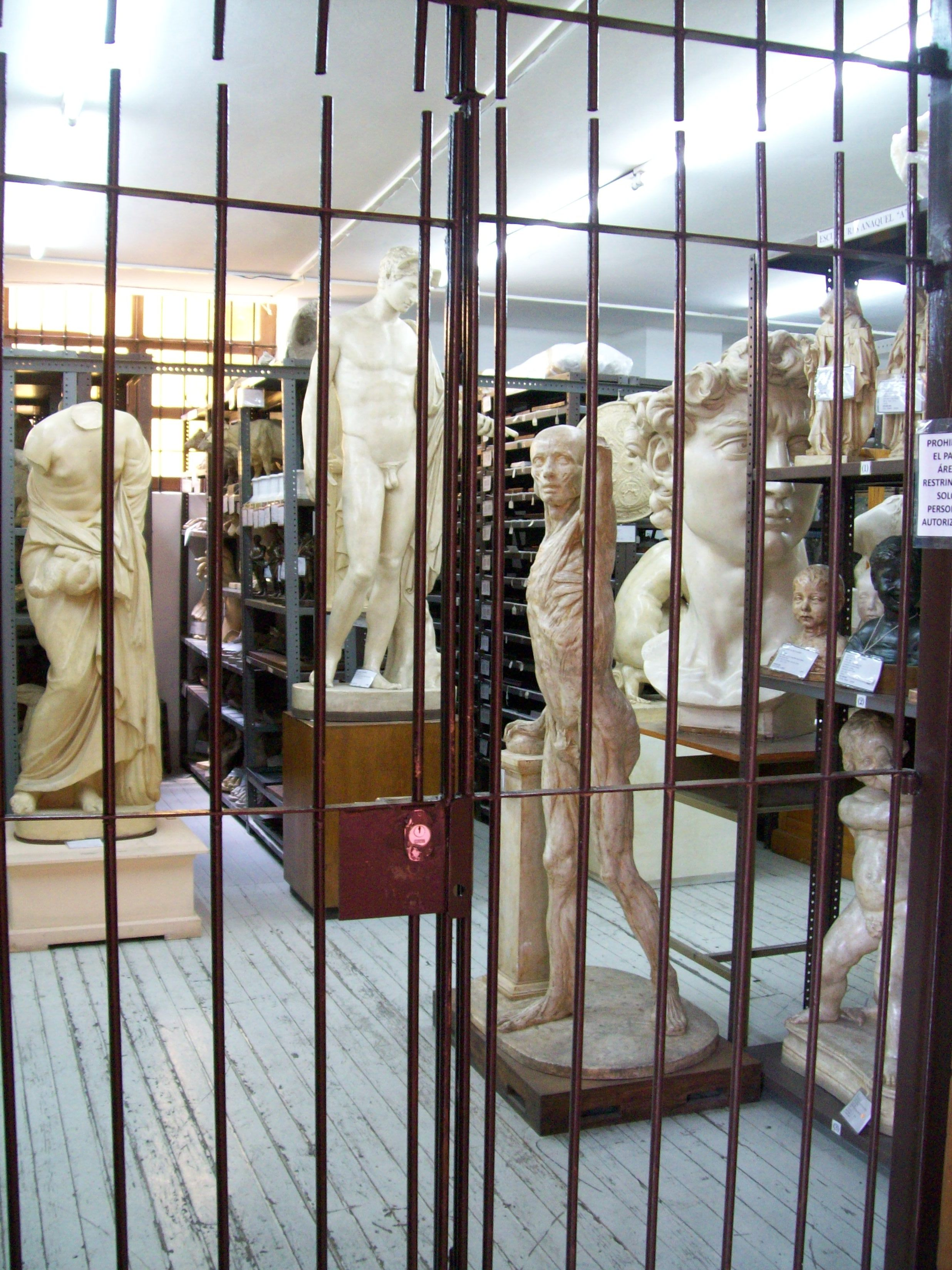 Monument ID.